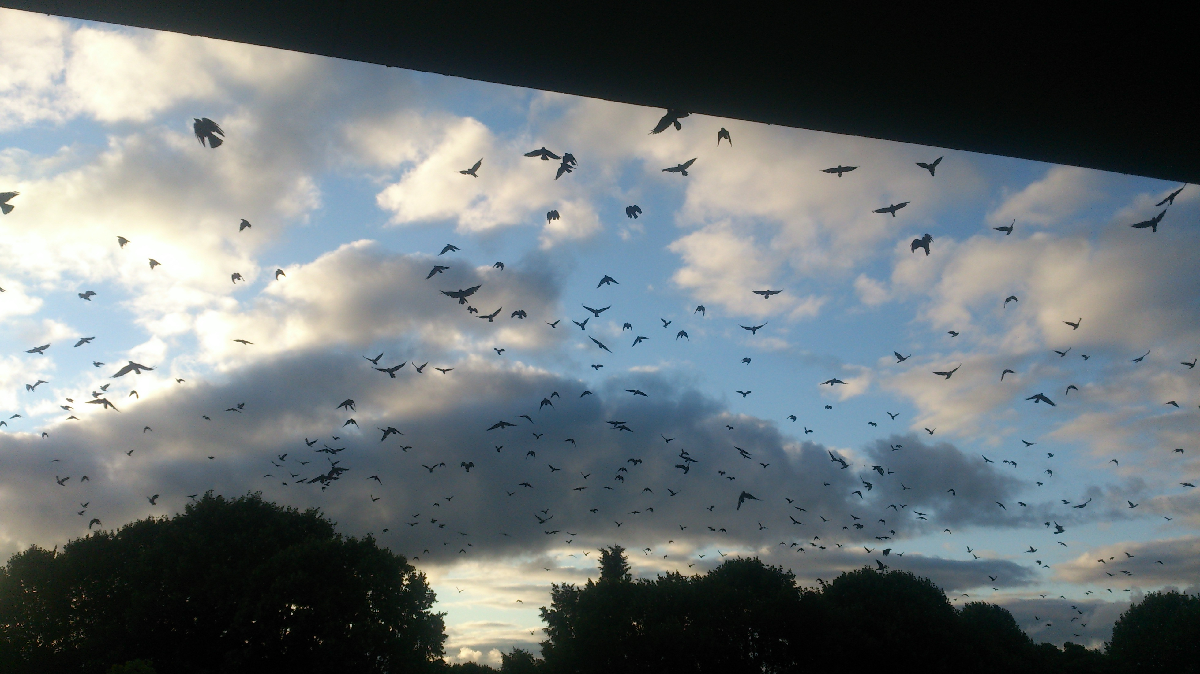 Tartu hakid Keskpargi kohal, vaade Kaubamaja rõdult, 31. juuli 2015